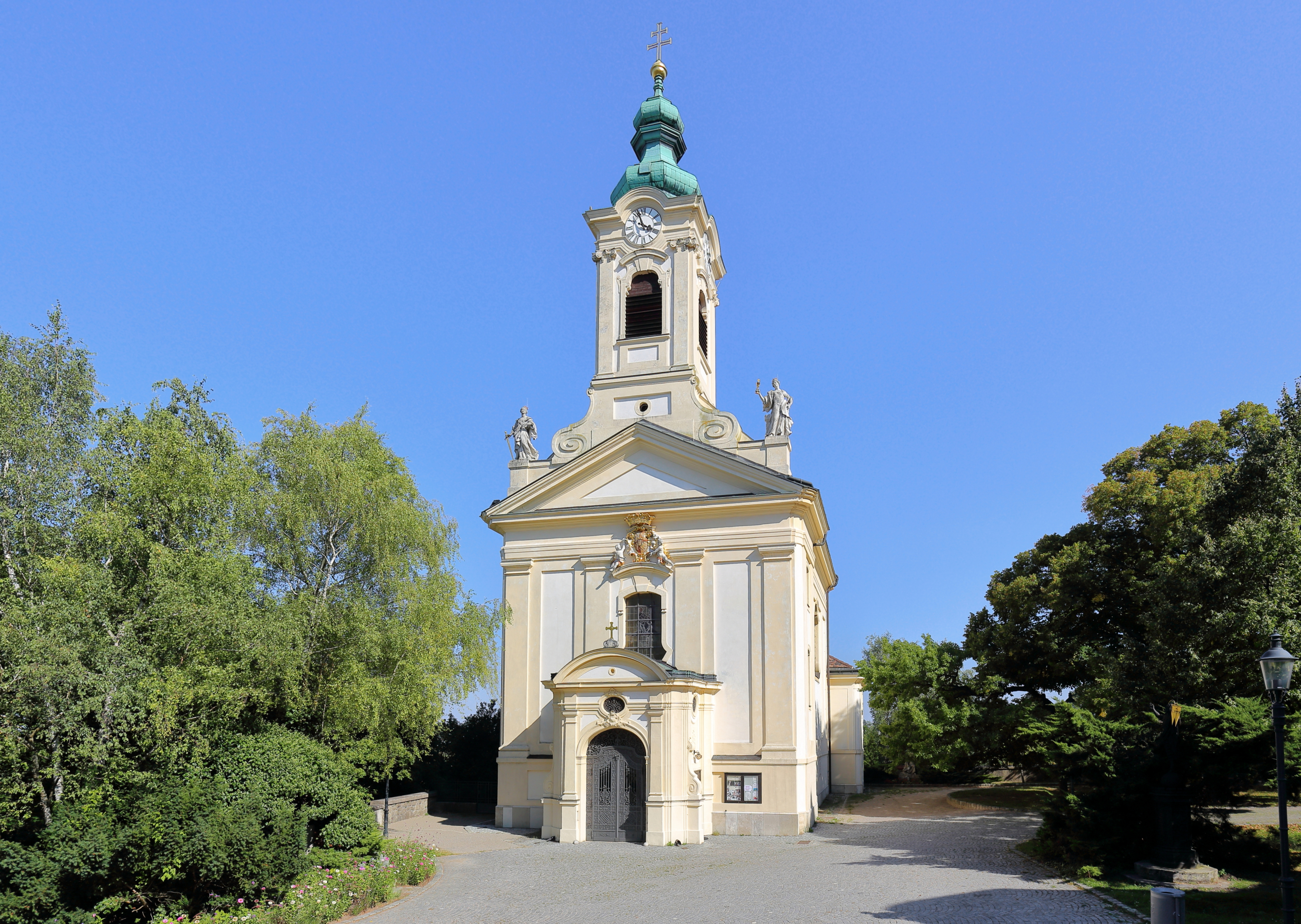 Nordwestansicht der Bergkirche Johannes der Täufer in Rodaun, ein Ortsteil des 23. Wiener Gemeindebezirkes Liesing.Die Barockkirche wurde von Eleonore von Sauberskirchen, verwitwete Rödderstahl und Besitzerin der Herrschaft Rodaun, gestiftet. Sie wurde ab 1739 vom Wiener Baumeister Johann Enzenhofer (1687-1755) auf einem künstlichen Plateau von etwa zwölf Metern Höhe errichtet und am 23. Juni 1745 geweiht. Im Jahr 1905 fügte Architekt Richard Merz einen Vorbau hinzu und veränderte die Turmfassade bzw. den Turm.